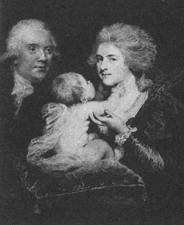 Князь Сергей Сергеевич Гагарин (1745-98) и его жена Варвара Николаевна, урожд. княжна Голицына